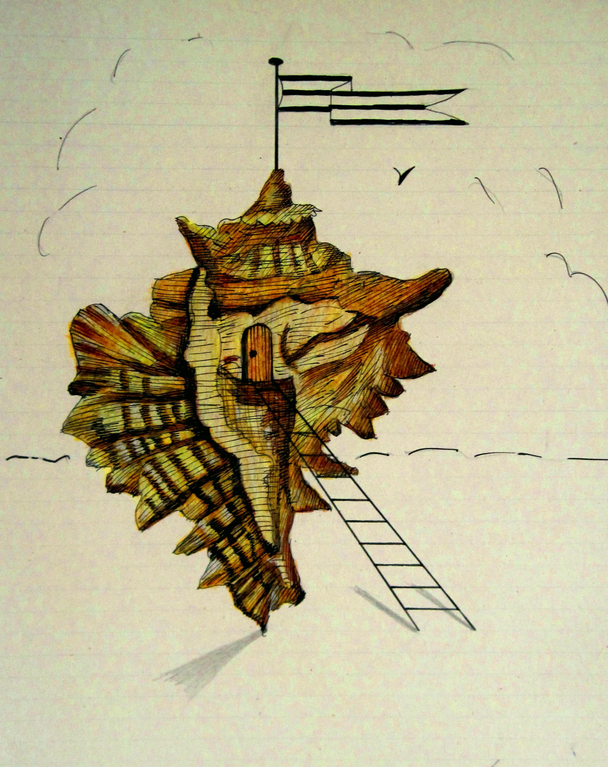 Alternatives Wohnen-1, 2018, Aquarell, Tusche, Farbstift